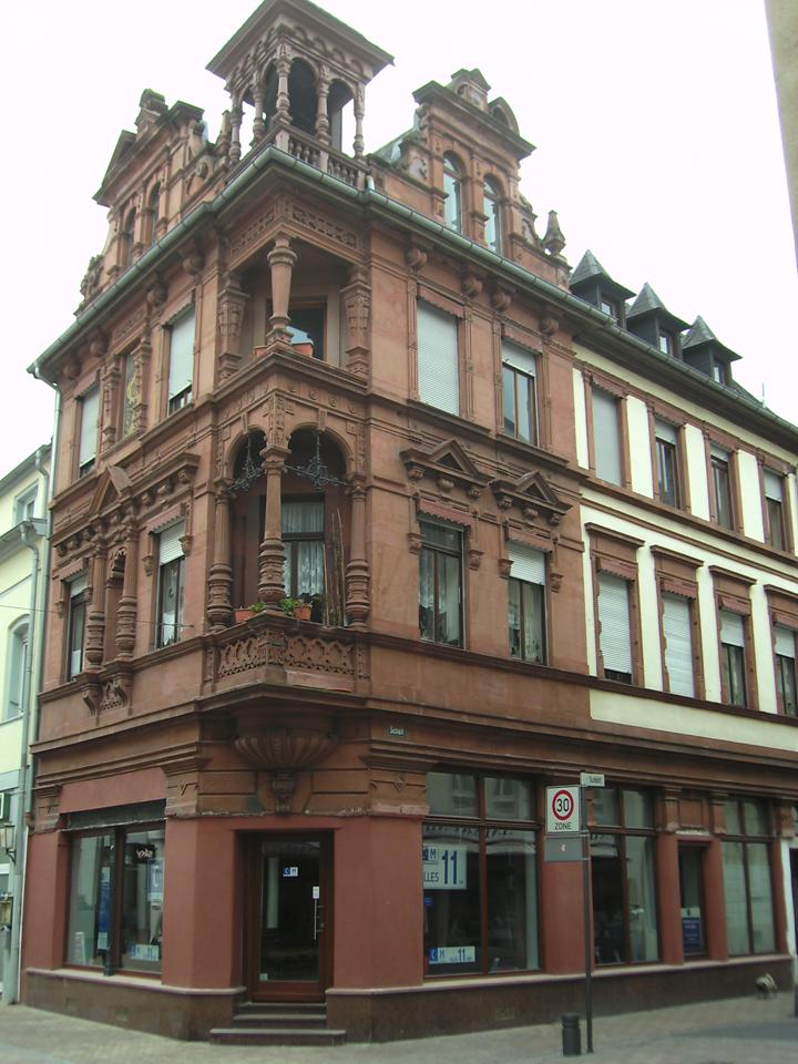 Neustadt (Weinstraße), Schütt 22: dreigeschossiges Neurenaissance-Eckwohn- und Geschäftshaus, bezeichnet 1881